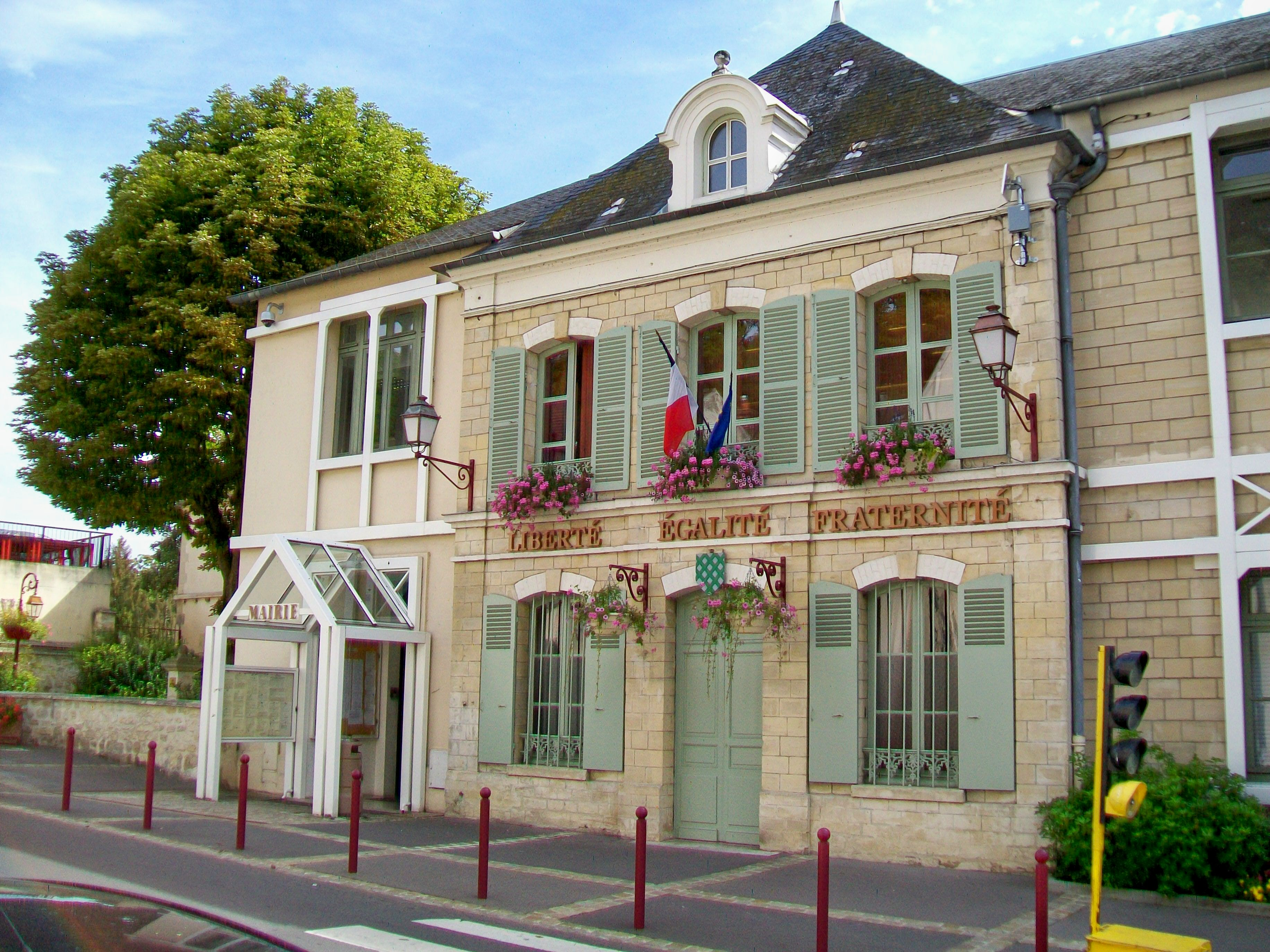 La mairie-école, rue Pierre-Brossolette : association d'un bâtiment conventionnel du XIXe siècle à une extension récente.